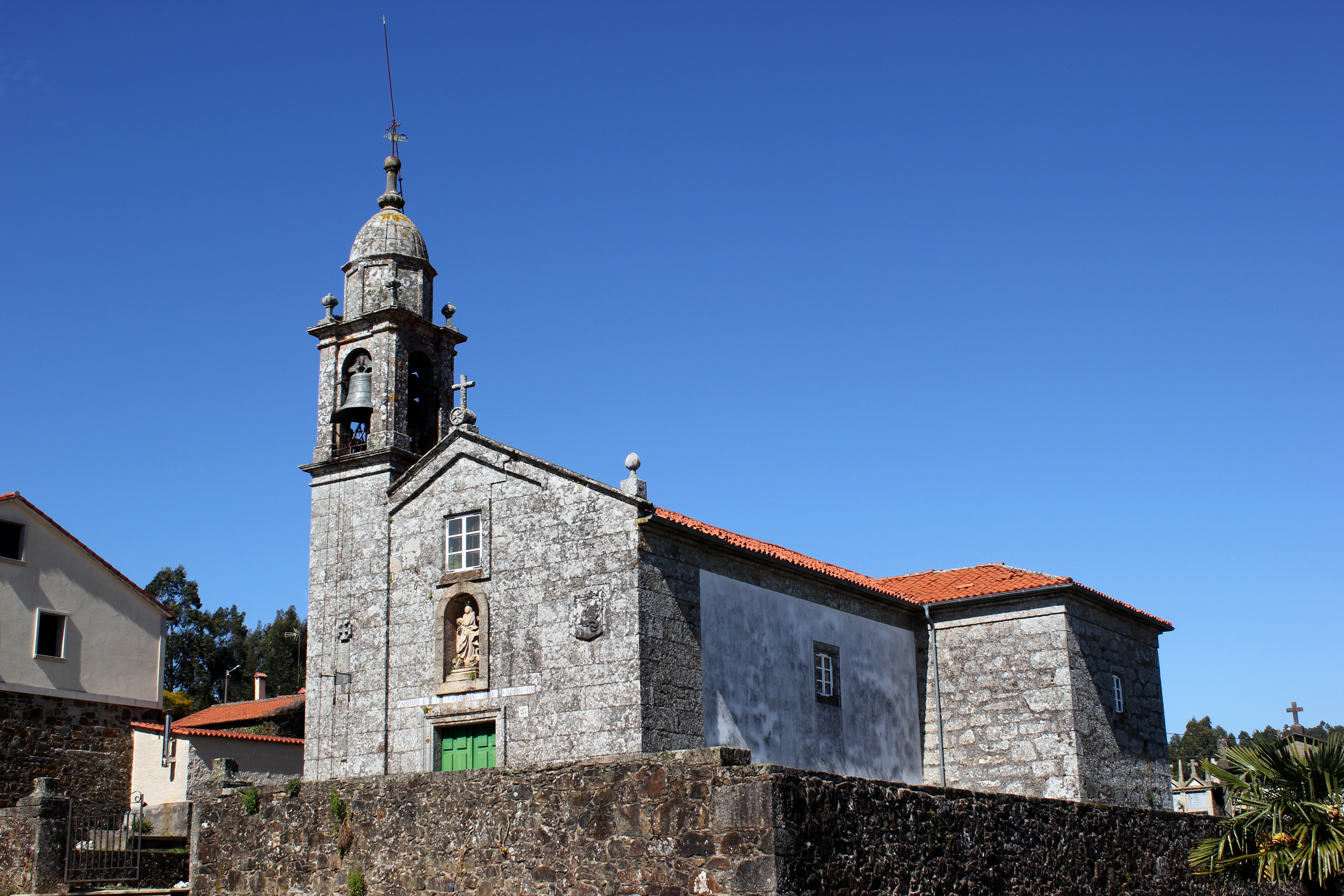 Igrexa de Santa María de Marrozos, no concello de Santiago de Compostela.